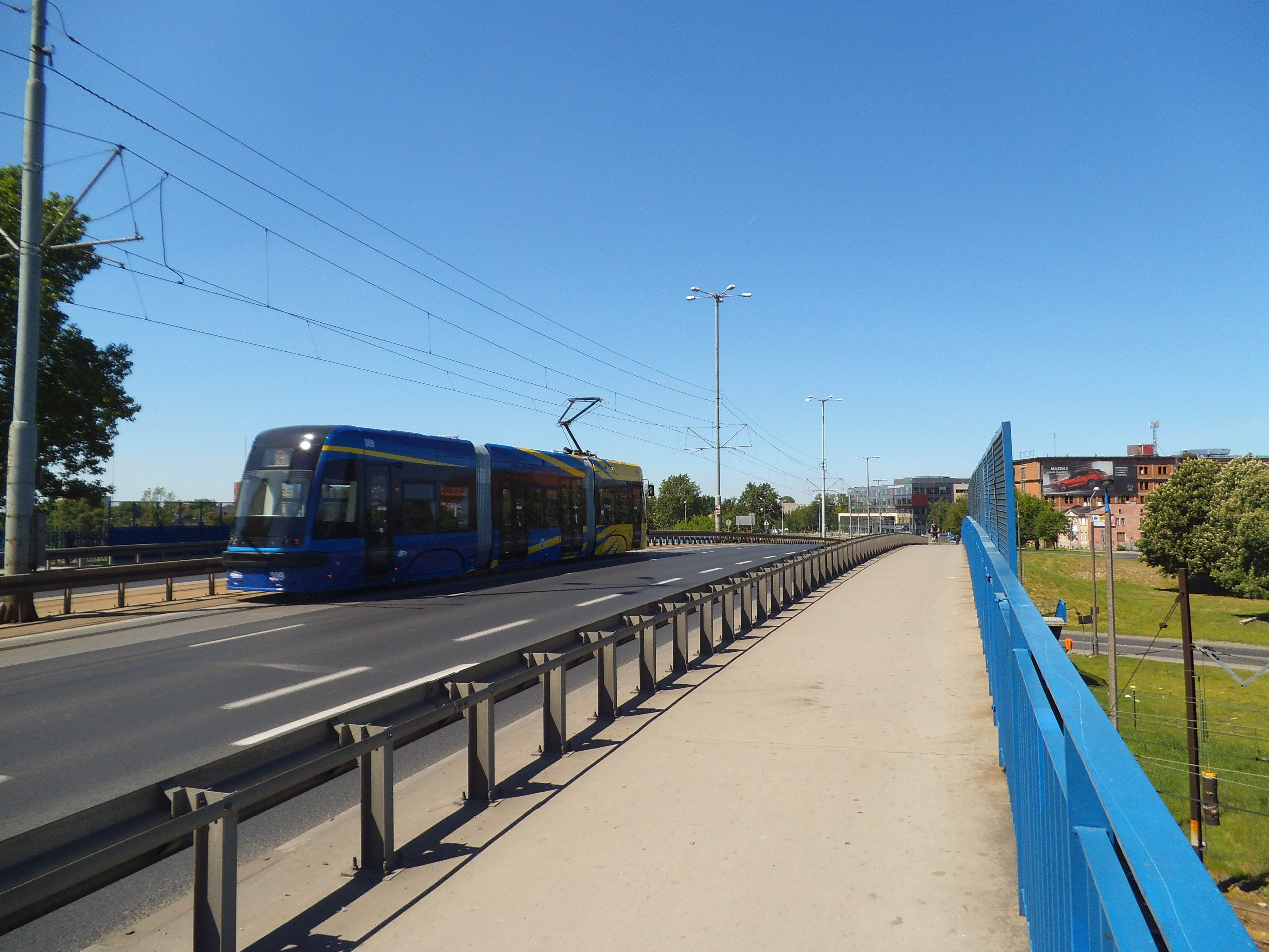 wiadukt im. Tadeusza Kościuszki w Toruniu